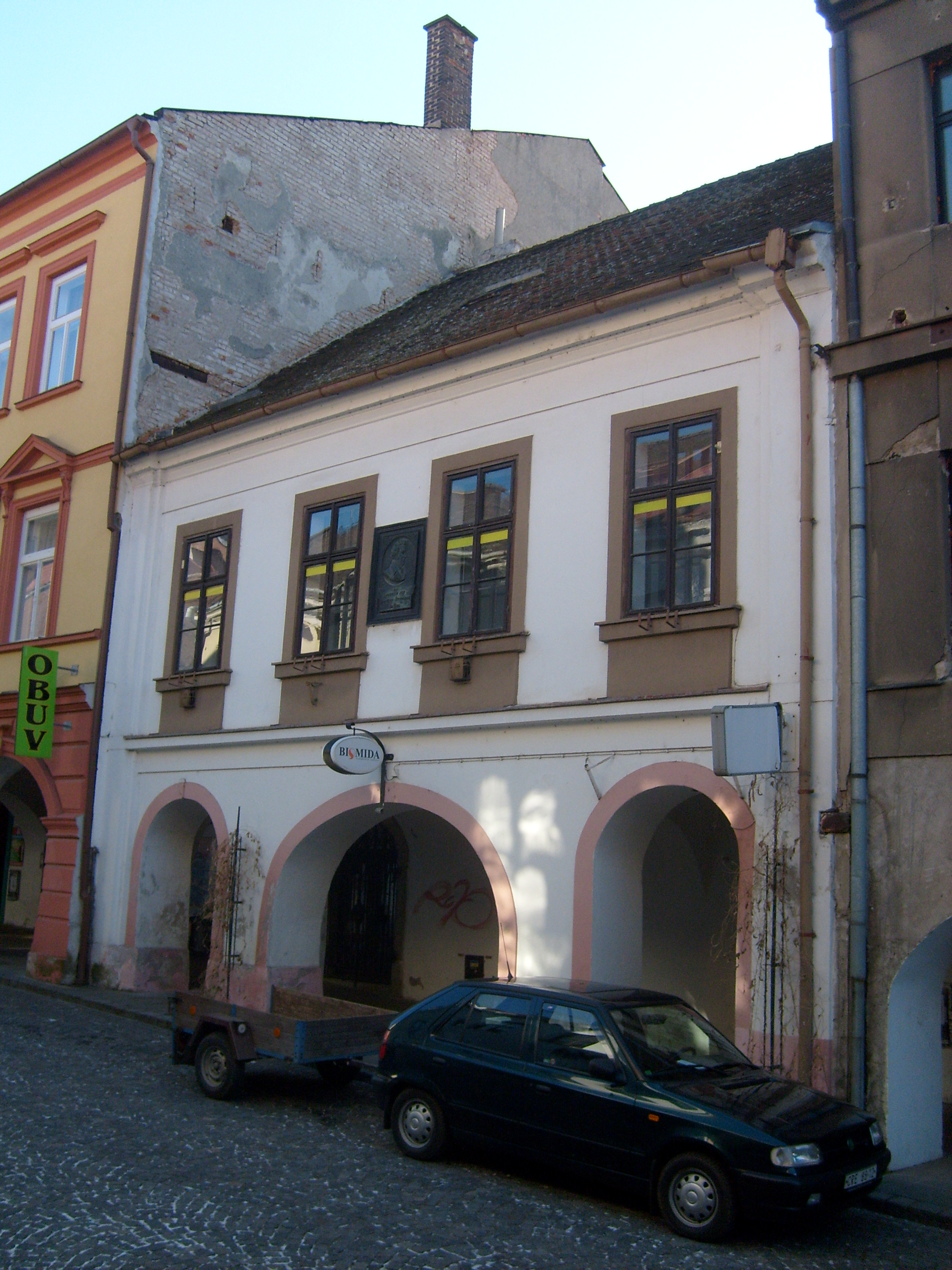 Rodný dům Jana Nepomuka Štěpánka, Štěpánkova ulice, Chrudim, Pardubice Region, Czech Republic